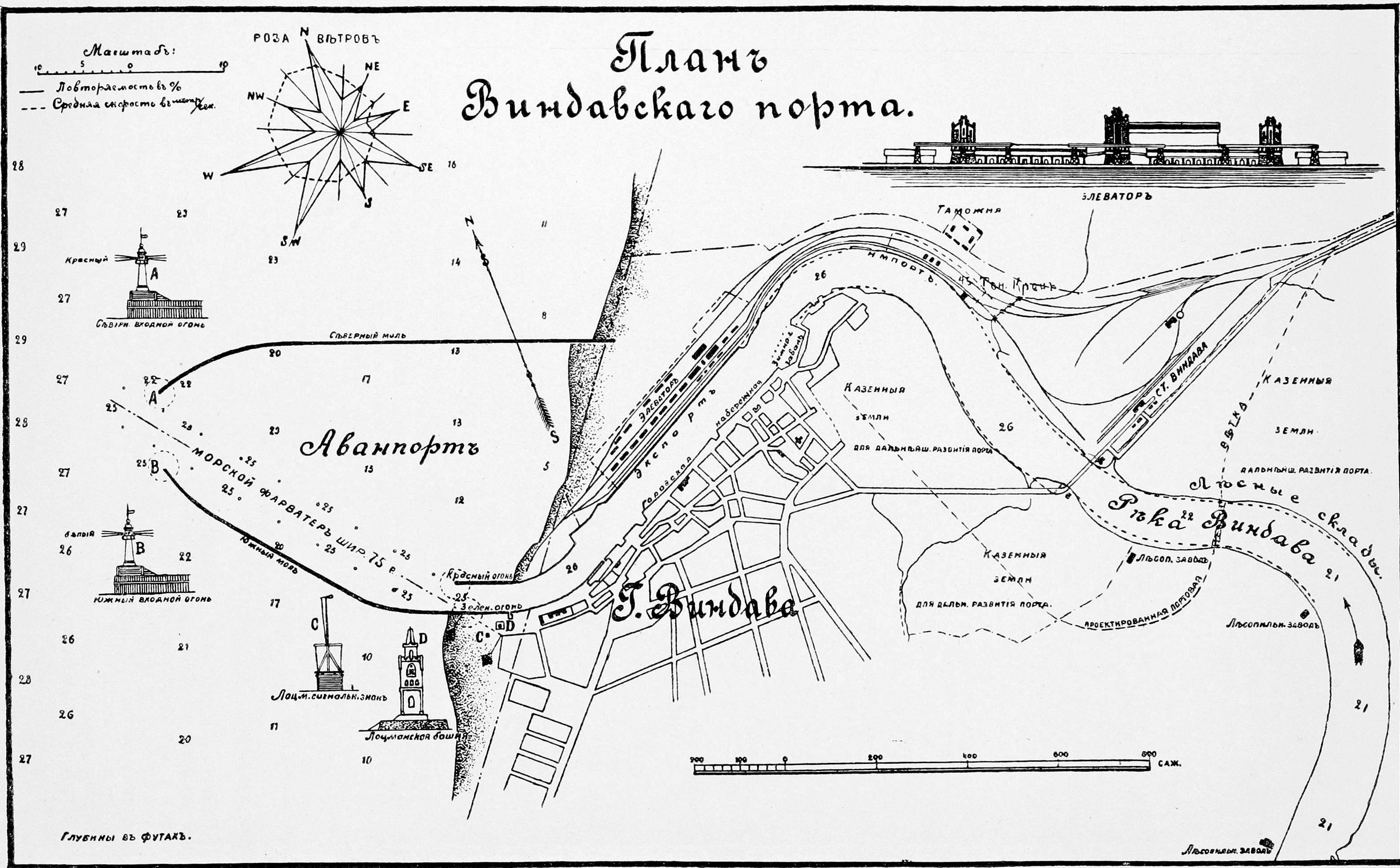 Данное изображение было использовано в статье «Виндава» опубликованной в шестом томе «Военной энциклопедии», который был издан книгоиздательским товариществом Ивана Дмитриевича Сытина в 1912 году в столице Российской империи городе Санкт-Петербурге.